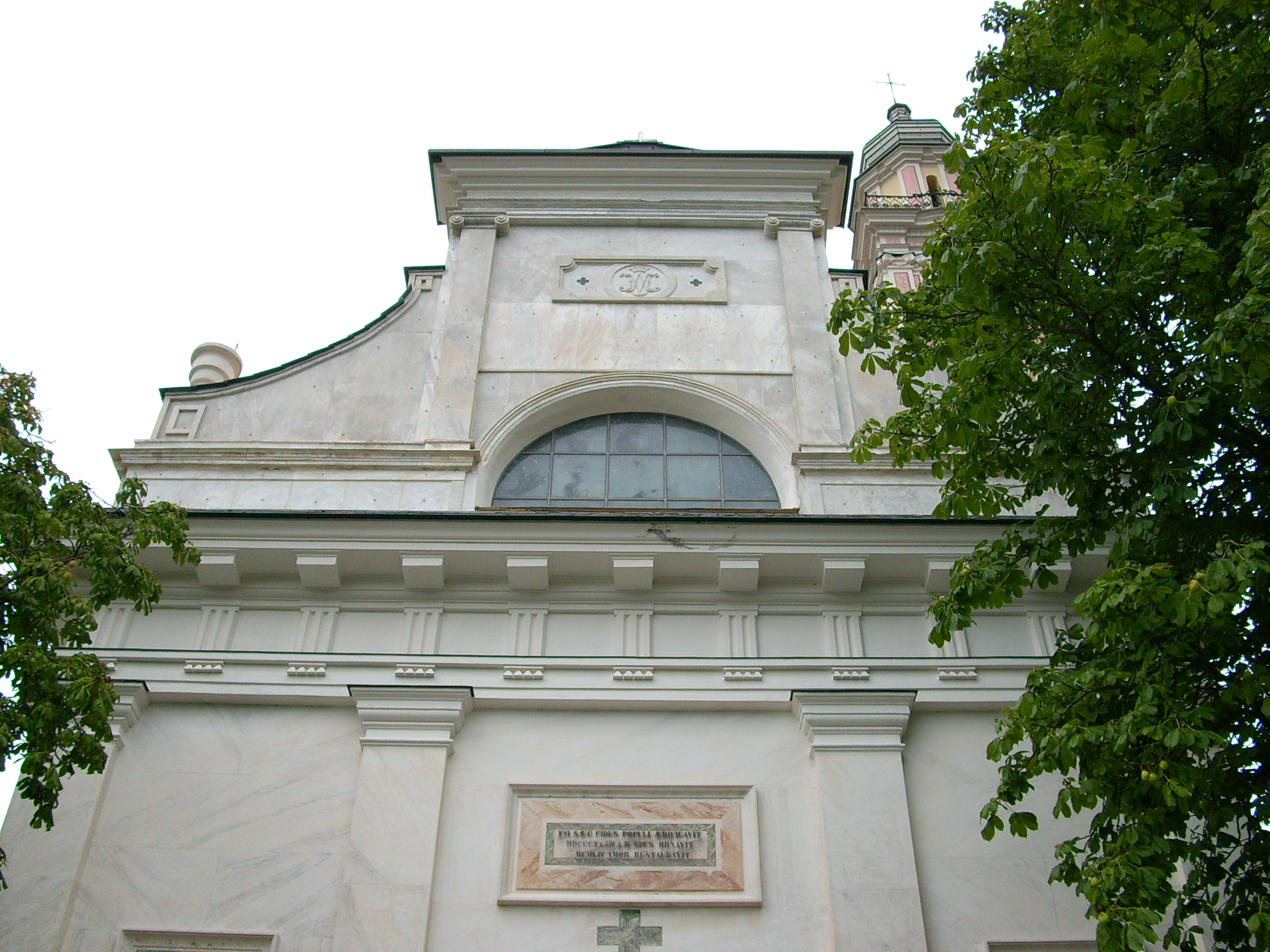 Chiesa di Santa Maria Assunta di Lorsica, Liguria, Italia